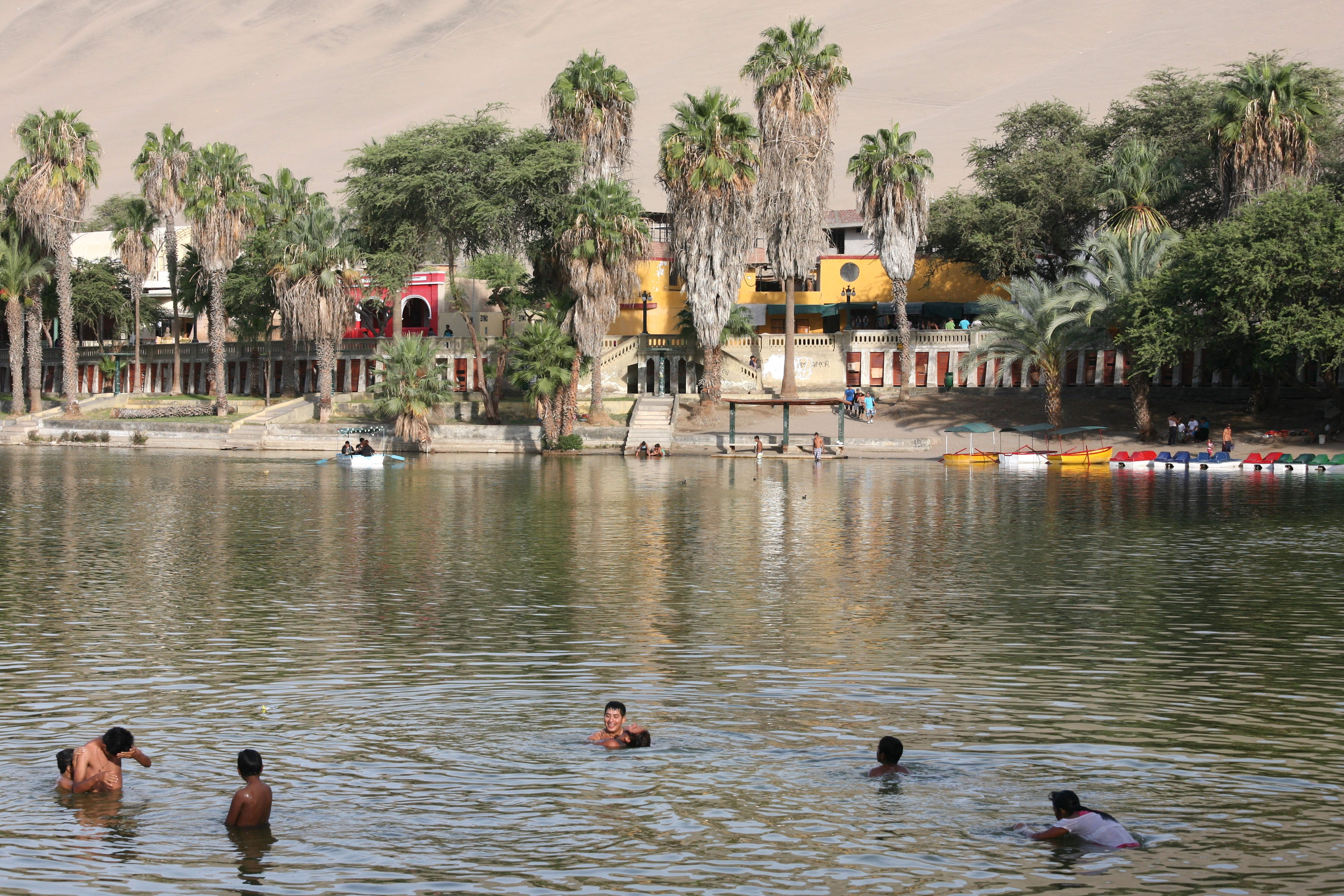 Huacachina Lagoon